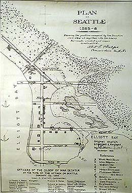 Kaart van Seattle, gemaakt in 1856